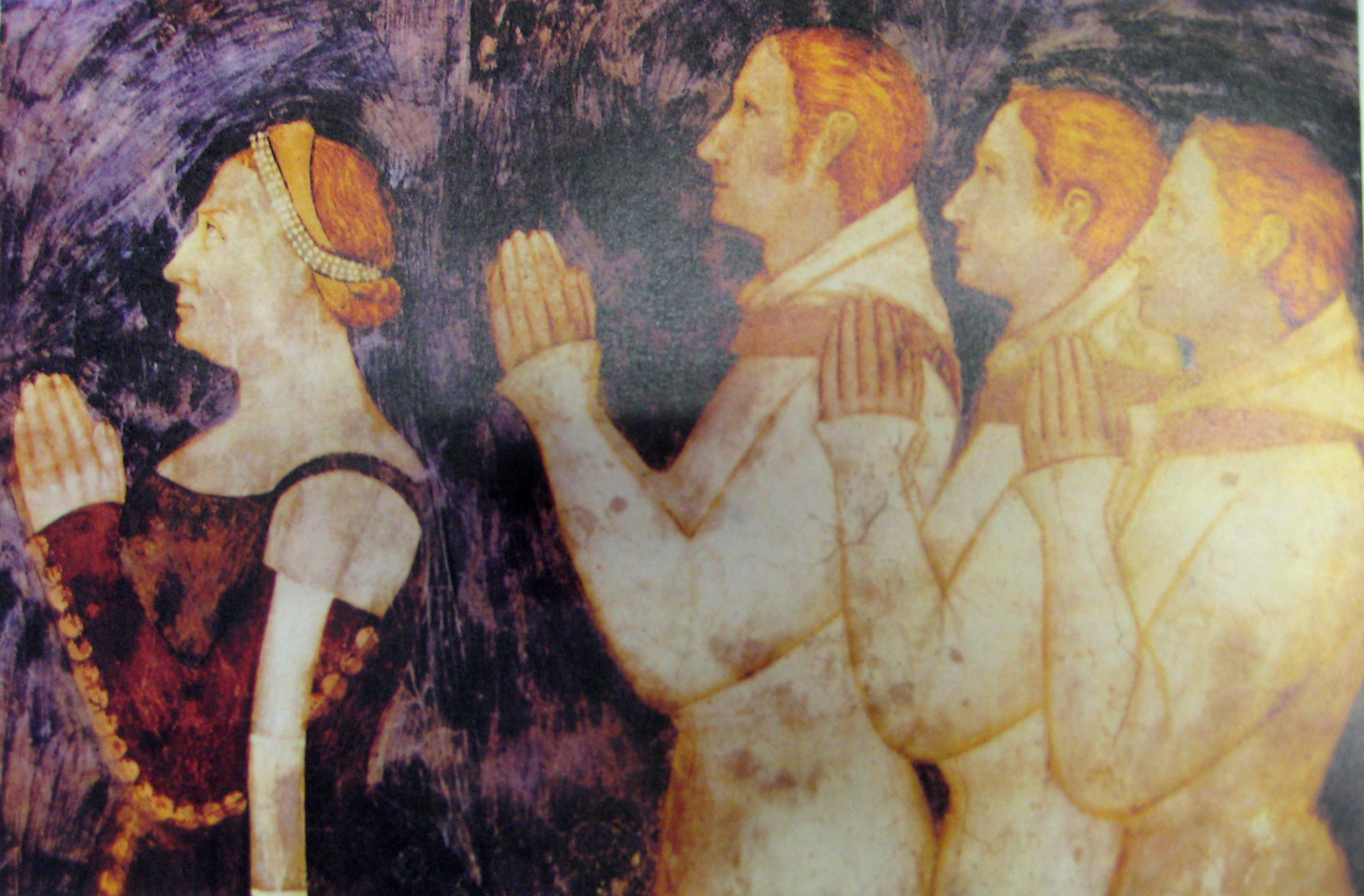 Stefano Porro e la sua famiglia nell'affresco di Lentate